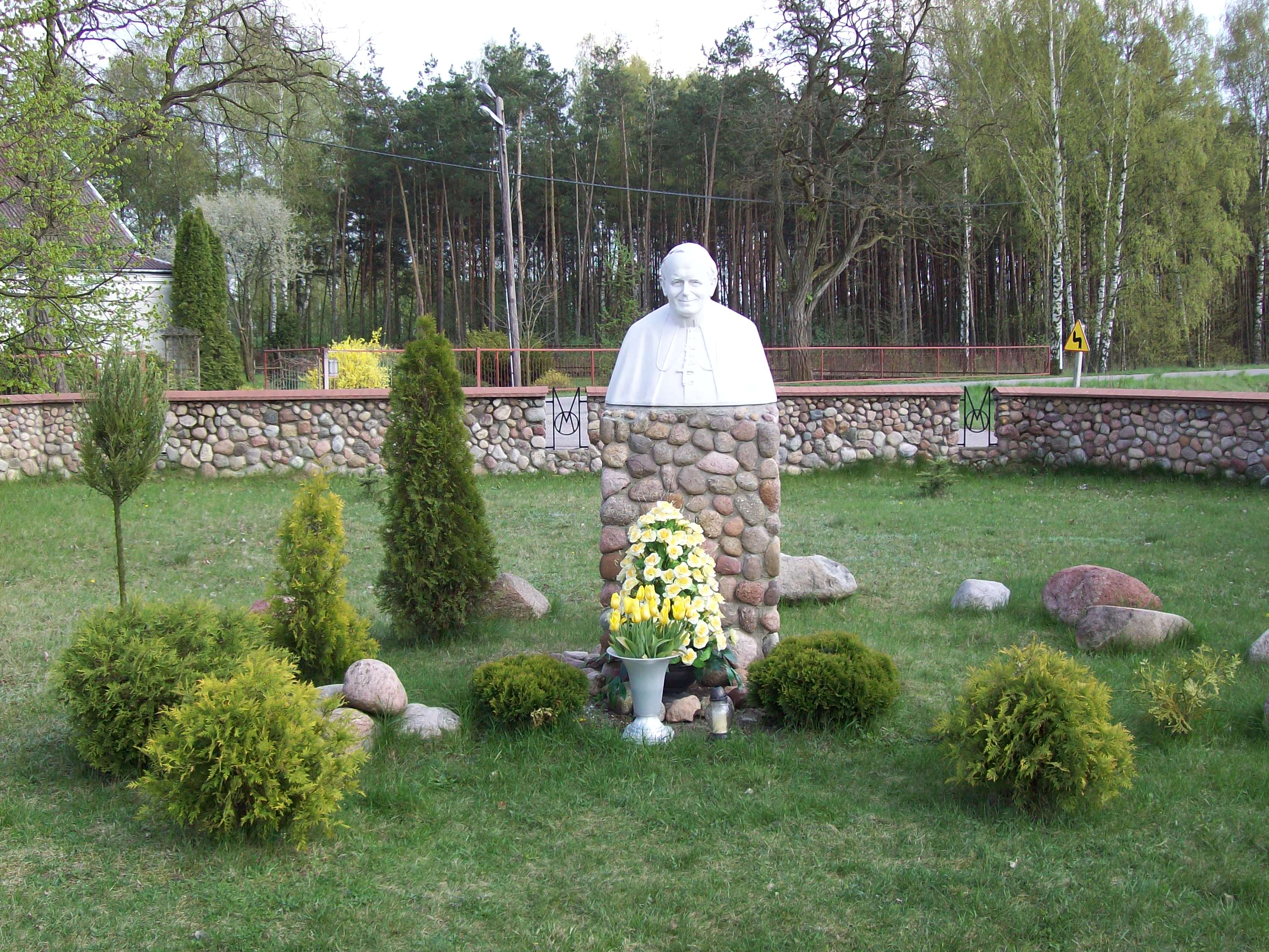 pomnik JPII w Świetym Miejscu